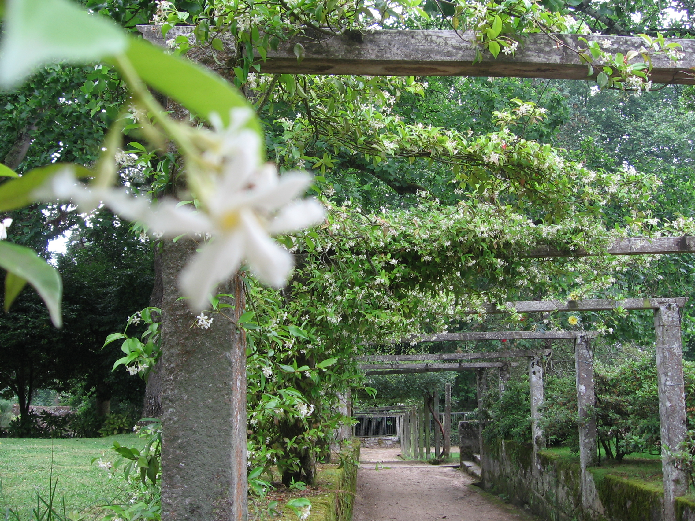 Corredor em Castrelos, Vigo